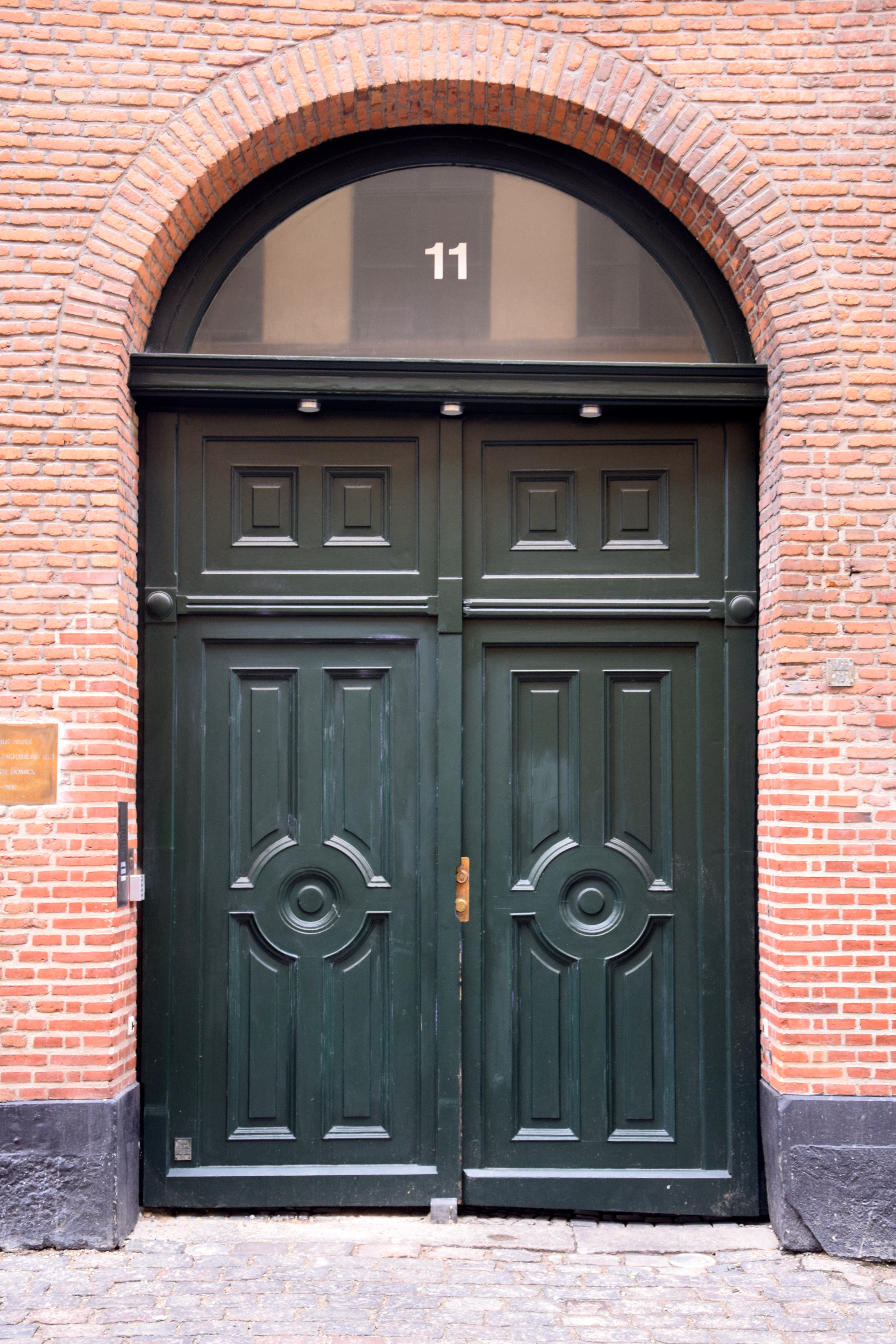 The gate at Brolæggerstræde 11 in Copenhagen, Denmark